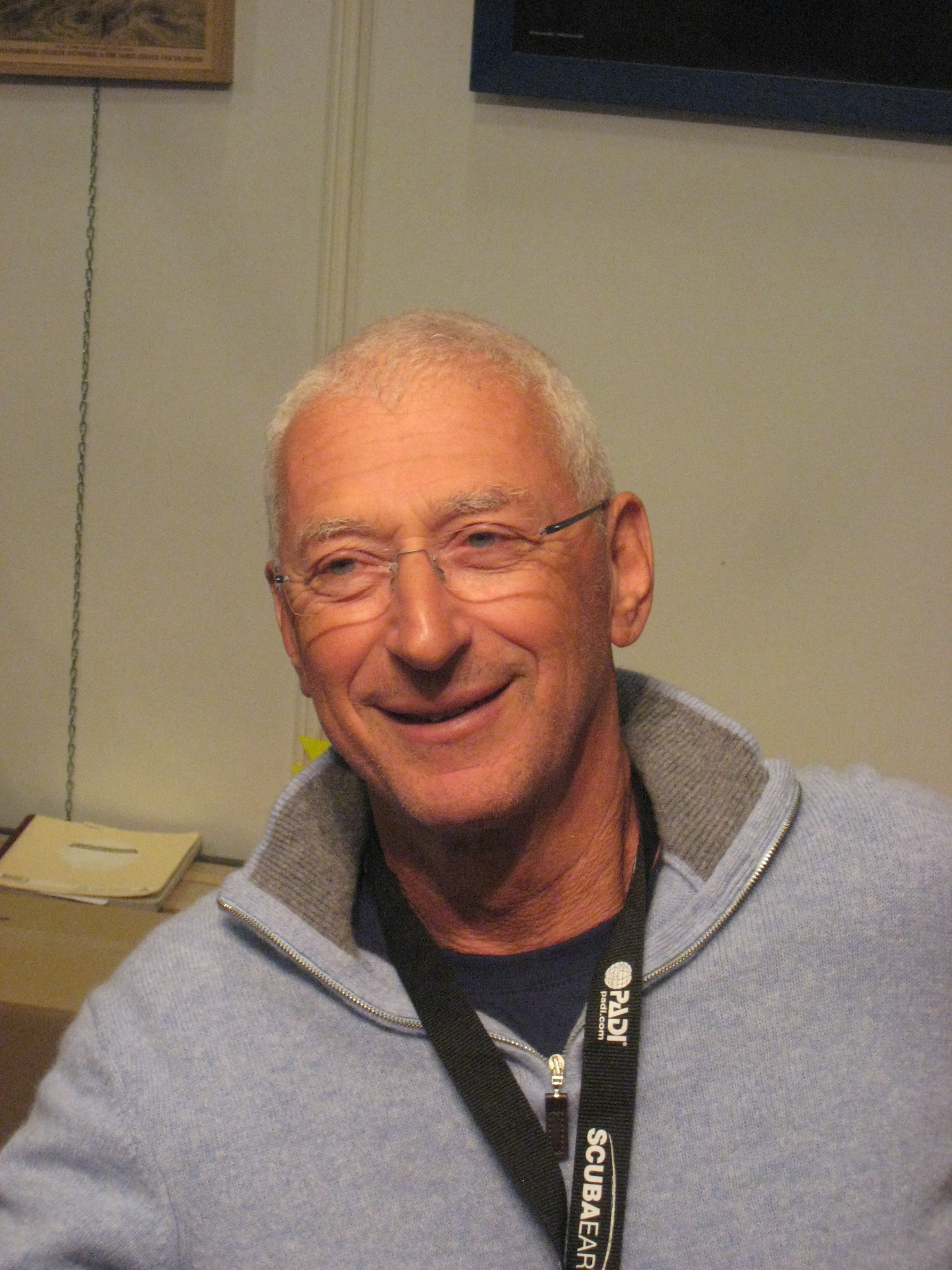 Steven Weinberg au Salon de la plongée 2013.